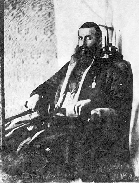 епископ Стефан Кнежевић, снимио Анастас Јовановић.